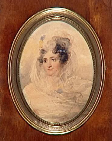 Marie Françoise Sophie Nichault de la Valette, épouse Gay